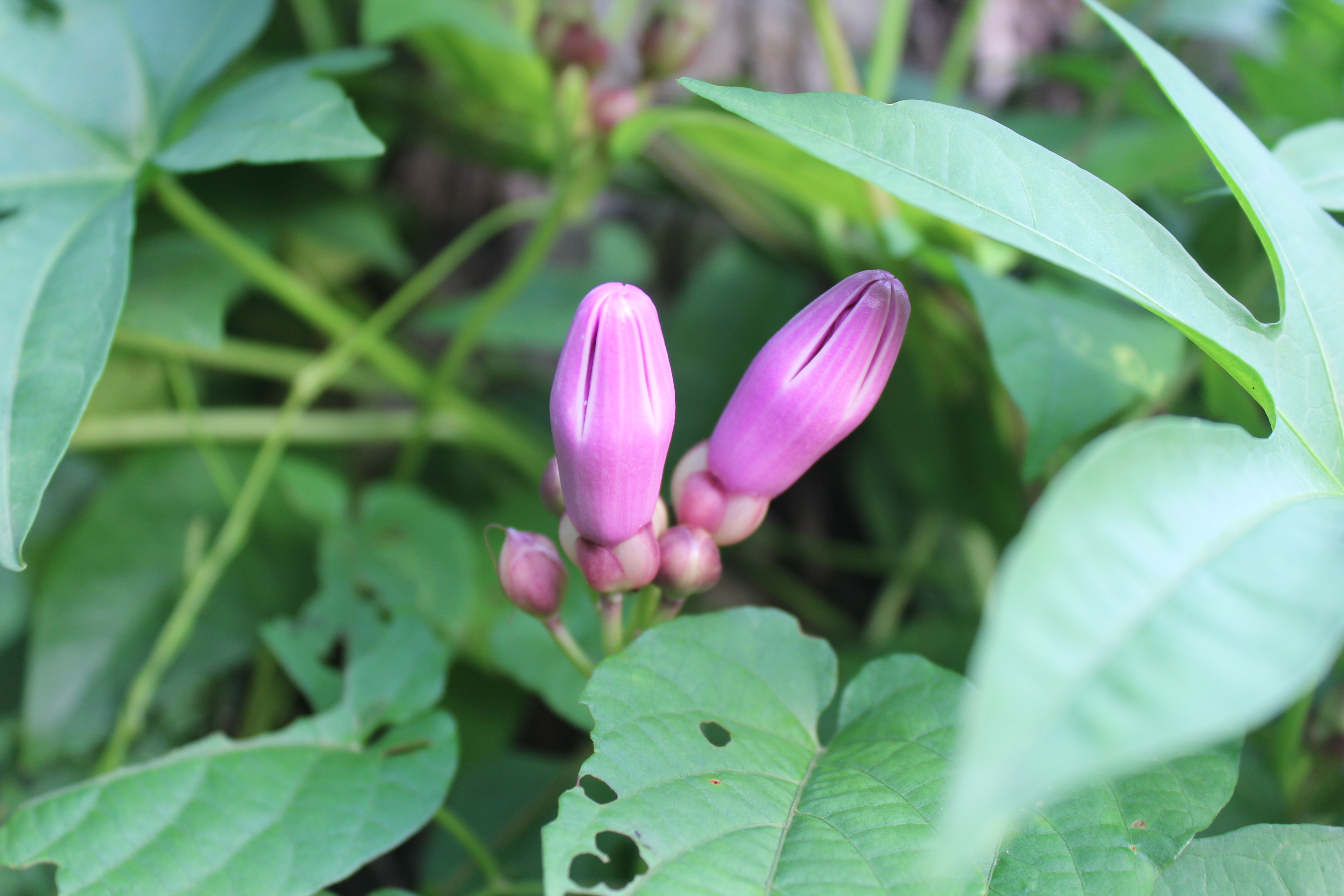 പാൽമുതുക്ക്